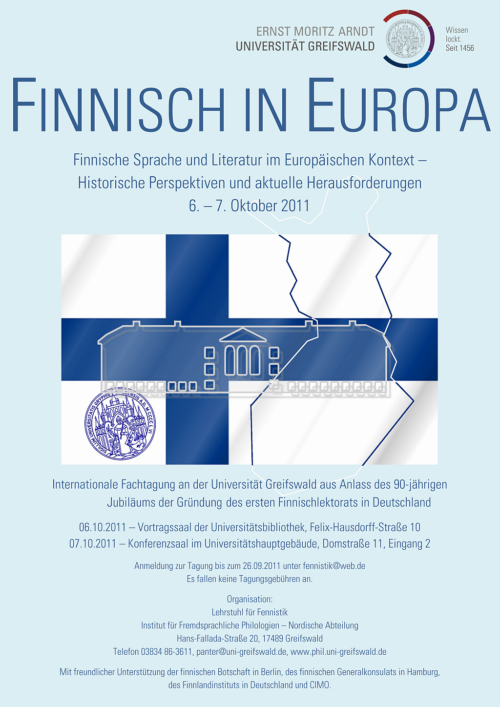 Plakat zur Internationalen Fachtagung " Finnische Sprache und Literatur im Europäischen Kontext - Historische Perspektiven und aktuelle Herausforderungen" anlässlich des Jubiläums "90 Jahre Finnischunterricht in Deutschland" am Lehrstuhl für Fennistik der Universität Greifswald (06.10.2011-07.10.2011). Plakatdesign: Franziska Fiebig